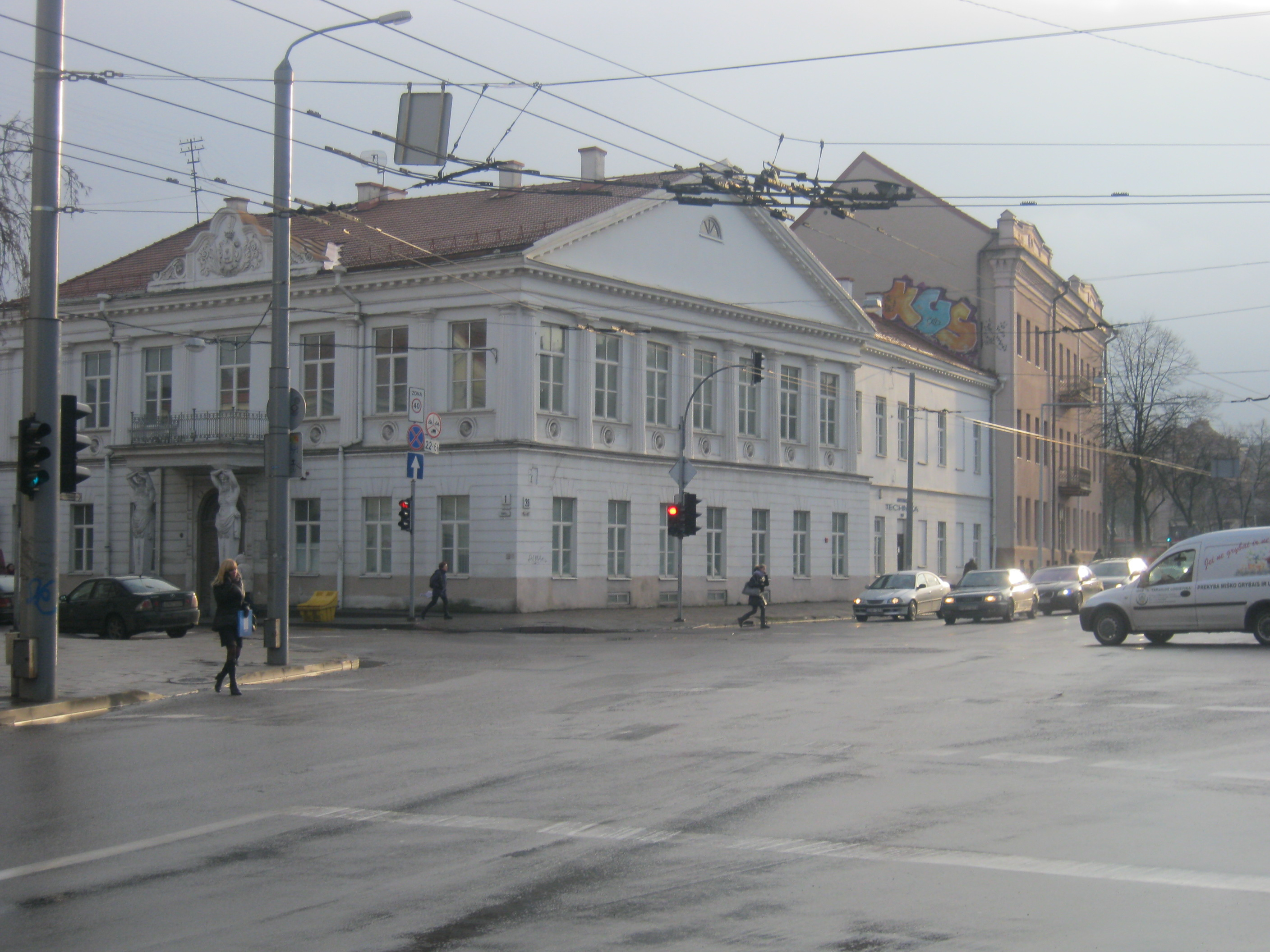 Architektai VGTU